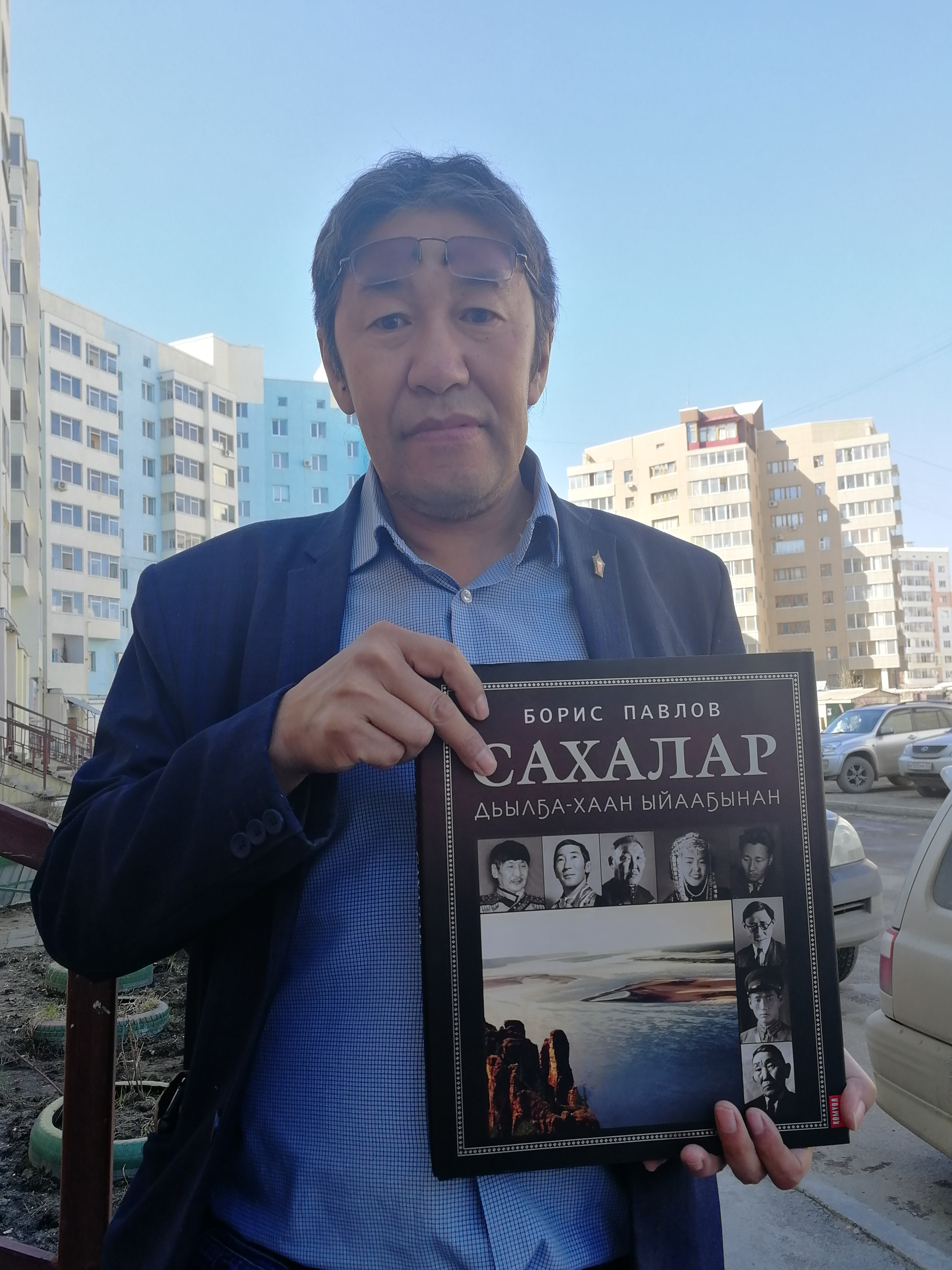 Саха тыла: Кэпсээнньит, суруналыыс, бэйиэт Барыыс Павлов. "Көмүөл" кыһа салайааччыта.